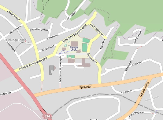 Kart over strøket Årnes i Rønvik bydel, Bodø.